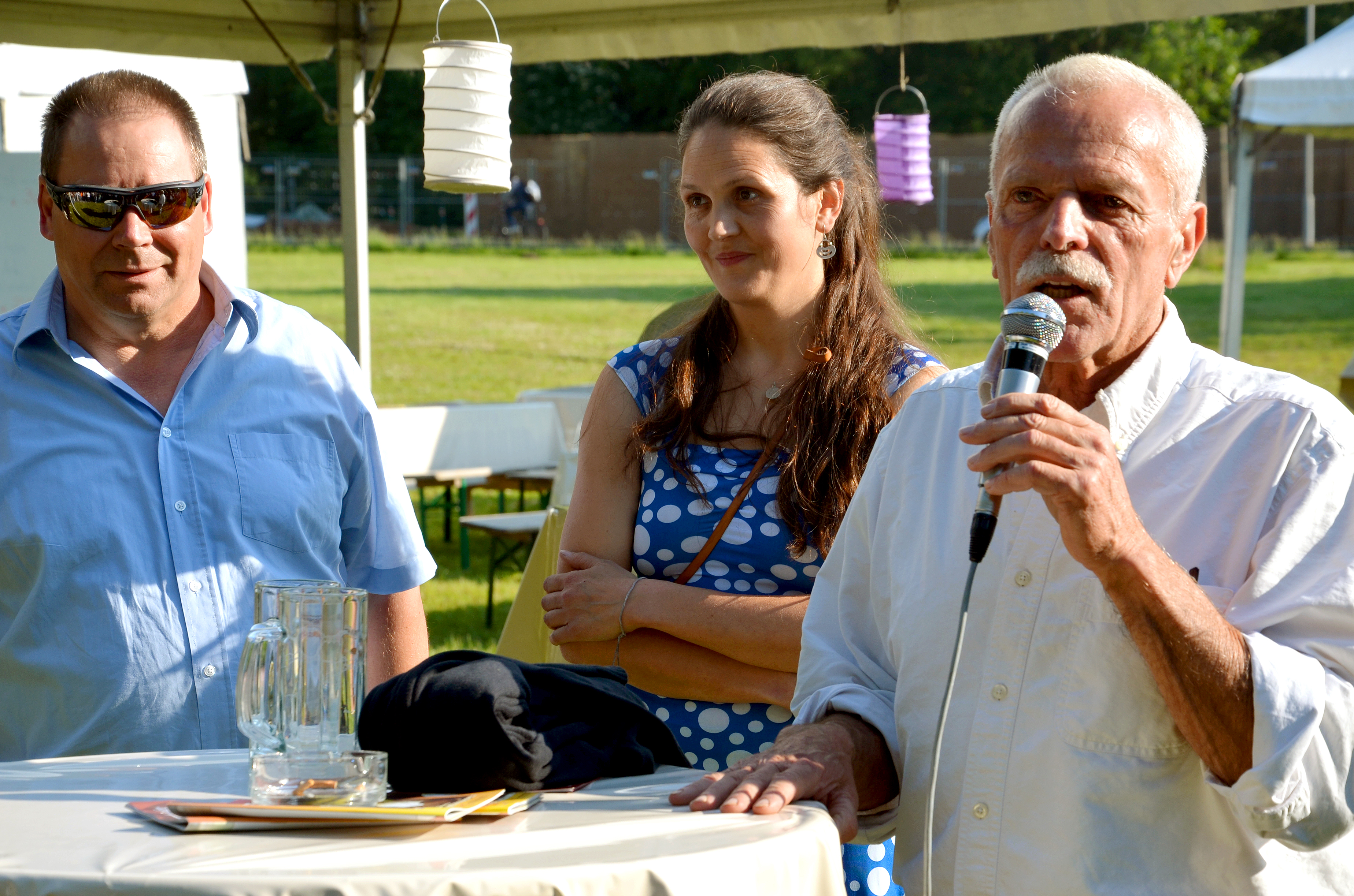 Eindrücke vom 17. Boulefestival Hannover vom 29. Mai bis zum 9. Juni 2014 entlang der Herrenhäuser Allee im Georgengarten, zu dessen Abschluss wie immer zur Pfingsttafel geladen wird ...